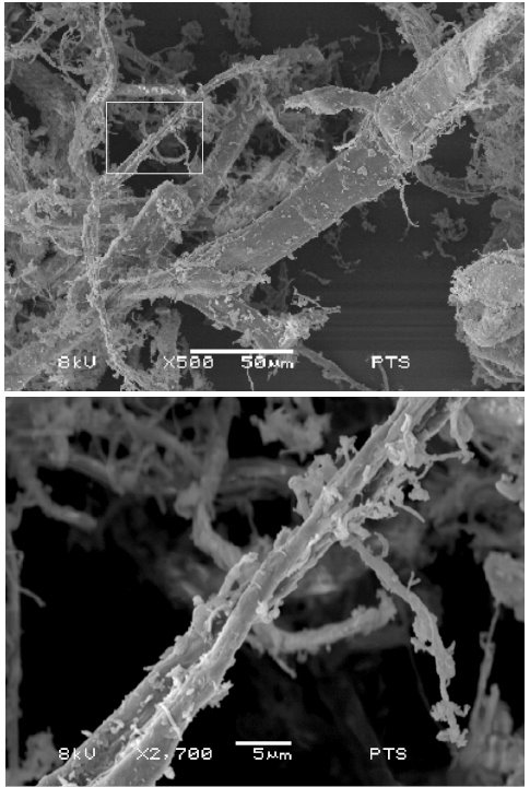 ERM Bild einer untraschall-behandelten, mittel fibrillierten Ramiefaser SETRALIT